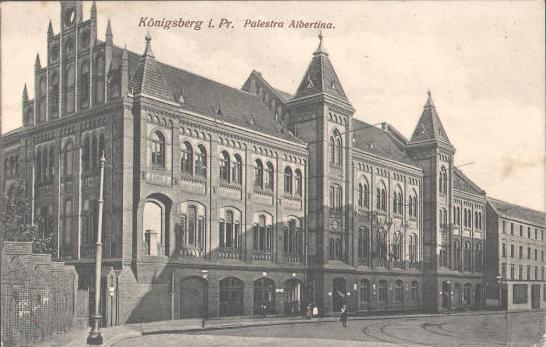 Die Palästra Alberina